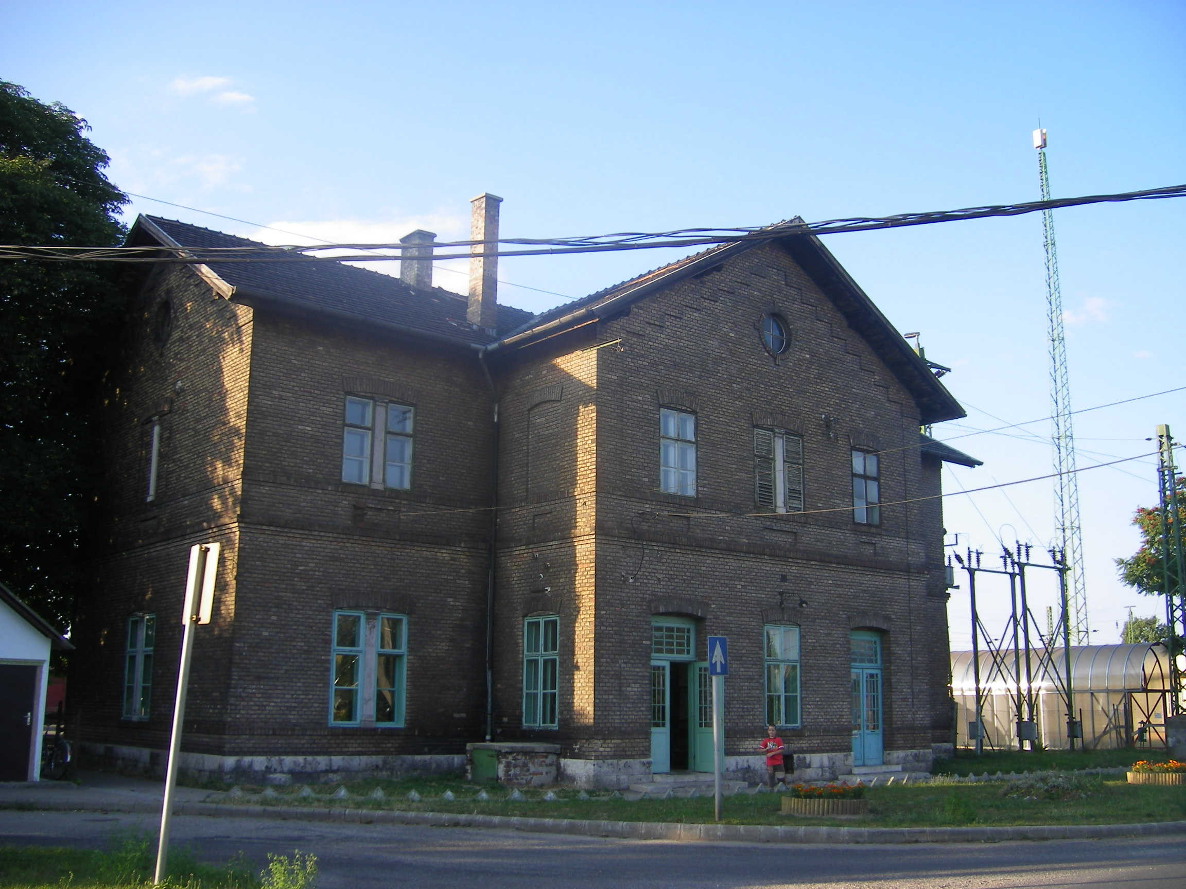 Ács - vasútállomás